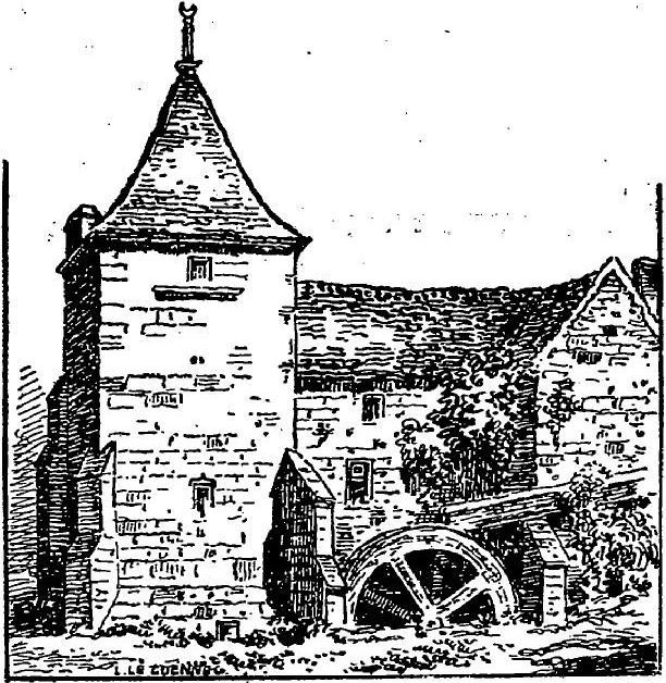 Dirinon : le moulin du Rouazle en 1929 (dessin de Louis Le Guennec, journal Ouest-Eclair n°10181 du 12 septembre 1929)